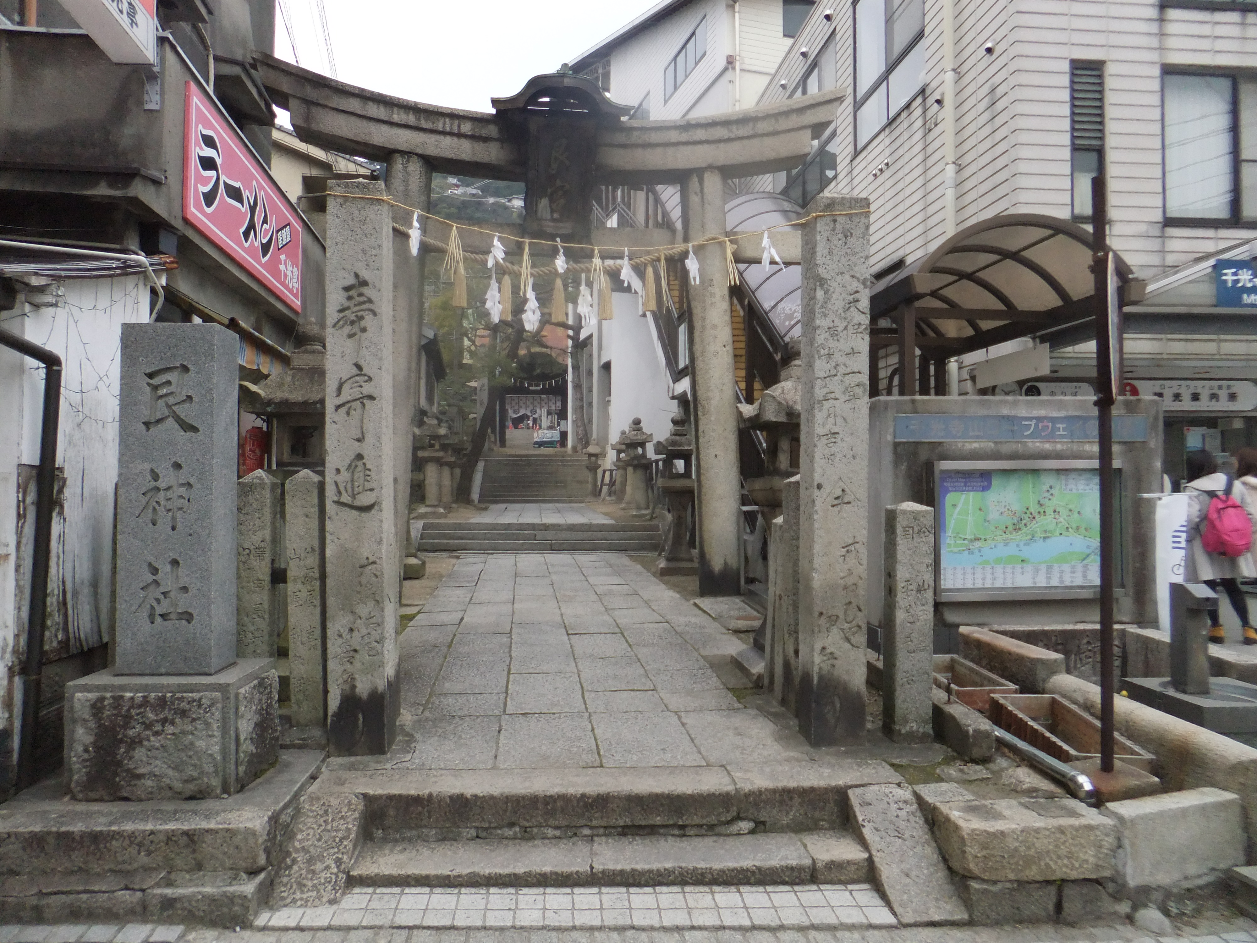 艮神社